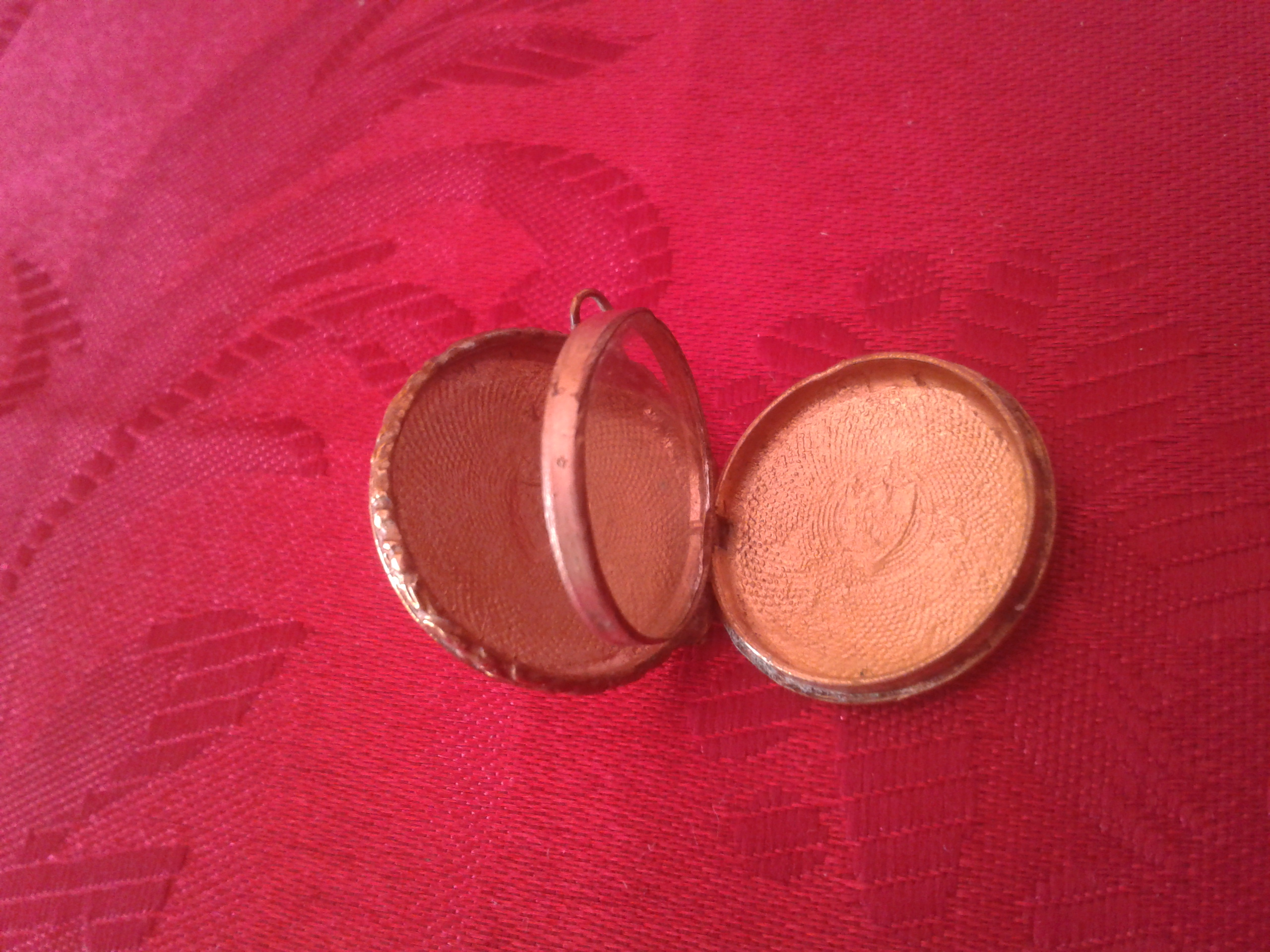 Guardapelo de plata dorada. S XIX. Servía como colgante y en su interior hay una pequeña cavidad cubierta por una puertecita de cristal de la misma forma que el guardapelo que protegía el cabello que como recuerdo se guardaba dentro